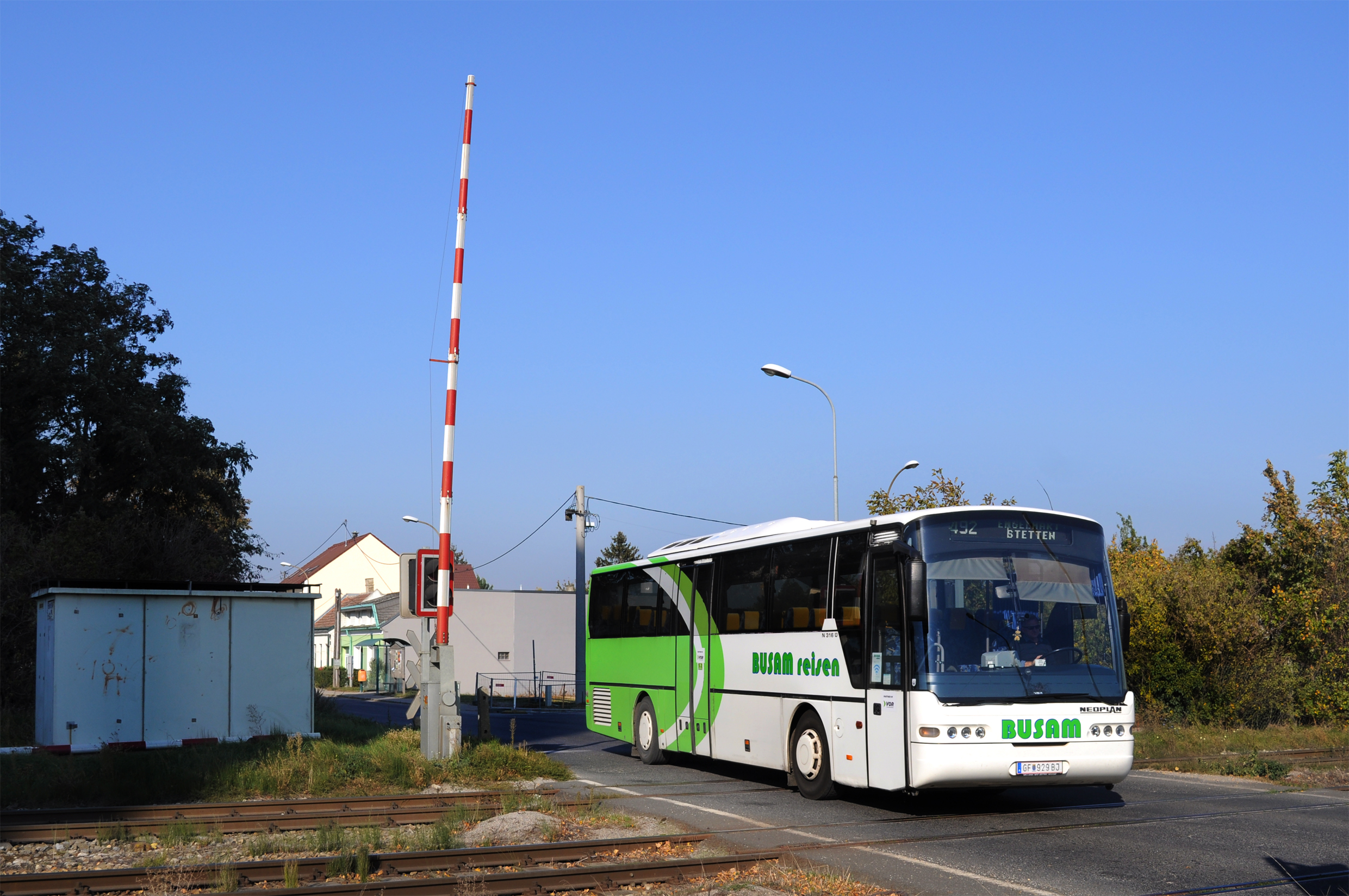 Neoplan N 316 Ü des Unternehmens Busam in VOR-Lackierung beim Bahnhof Siebenbrunn-Leopoldsdorf.